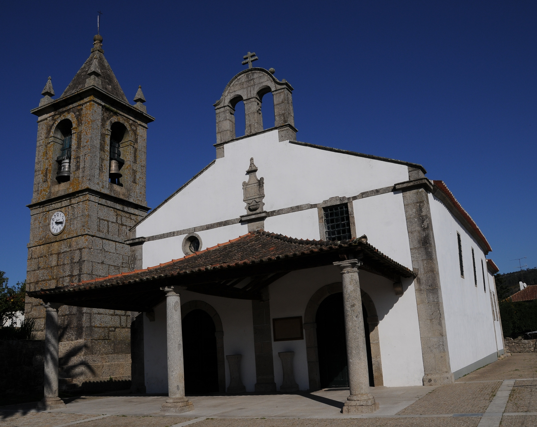 Santo Estevao de Penso Church, in Braga, Portugal